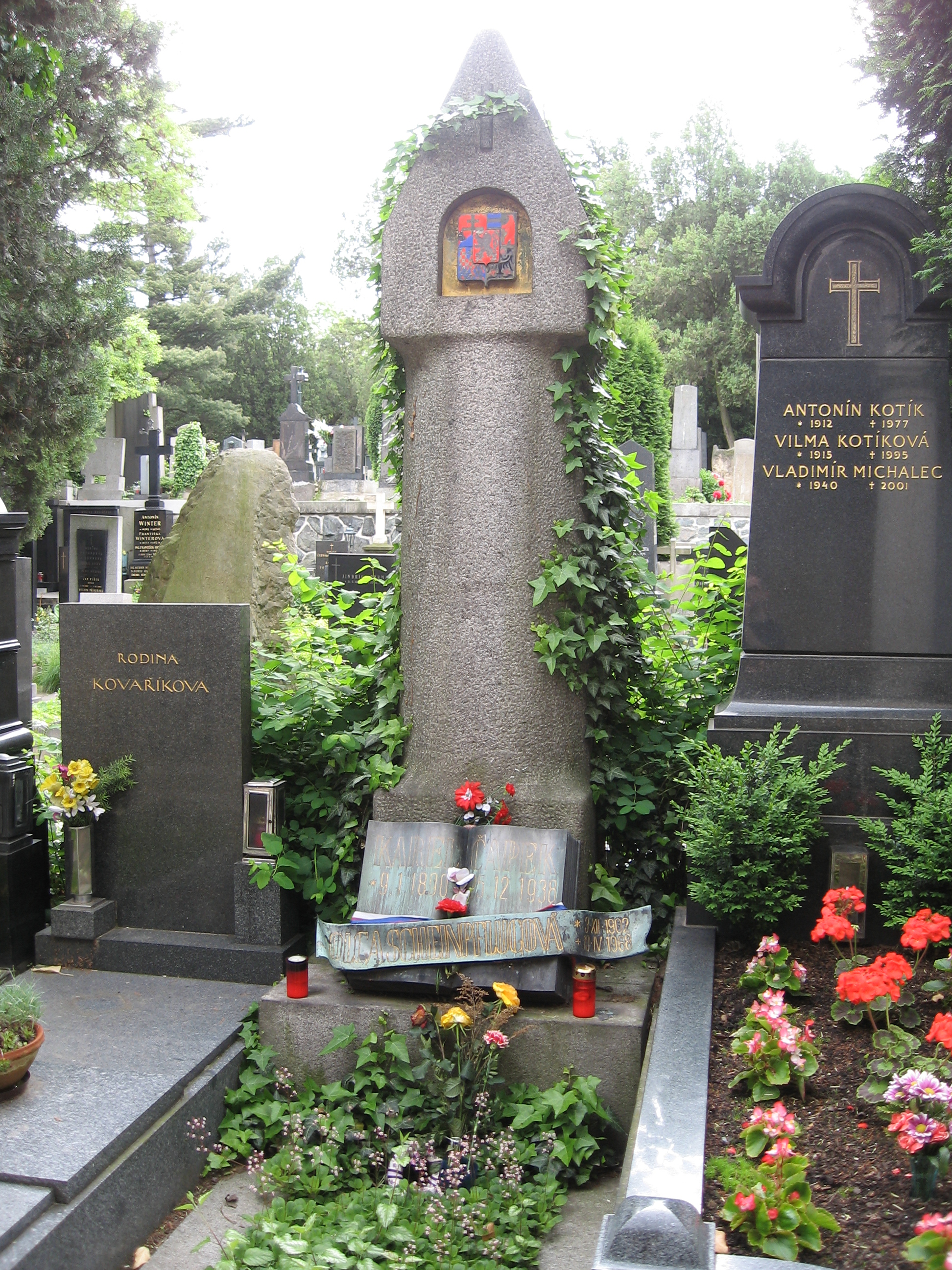 Náhrobek Karla Čapka a Olgy Scheinpflugové